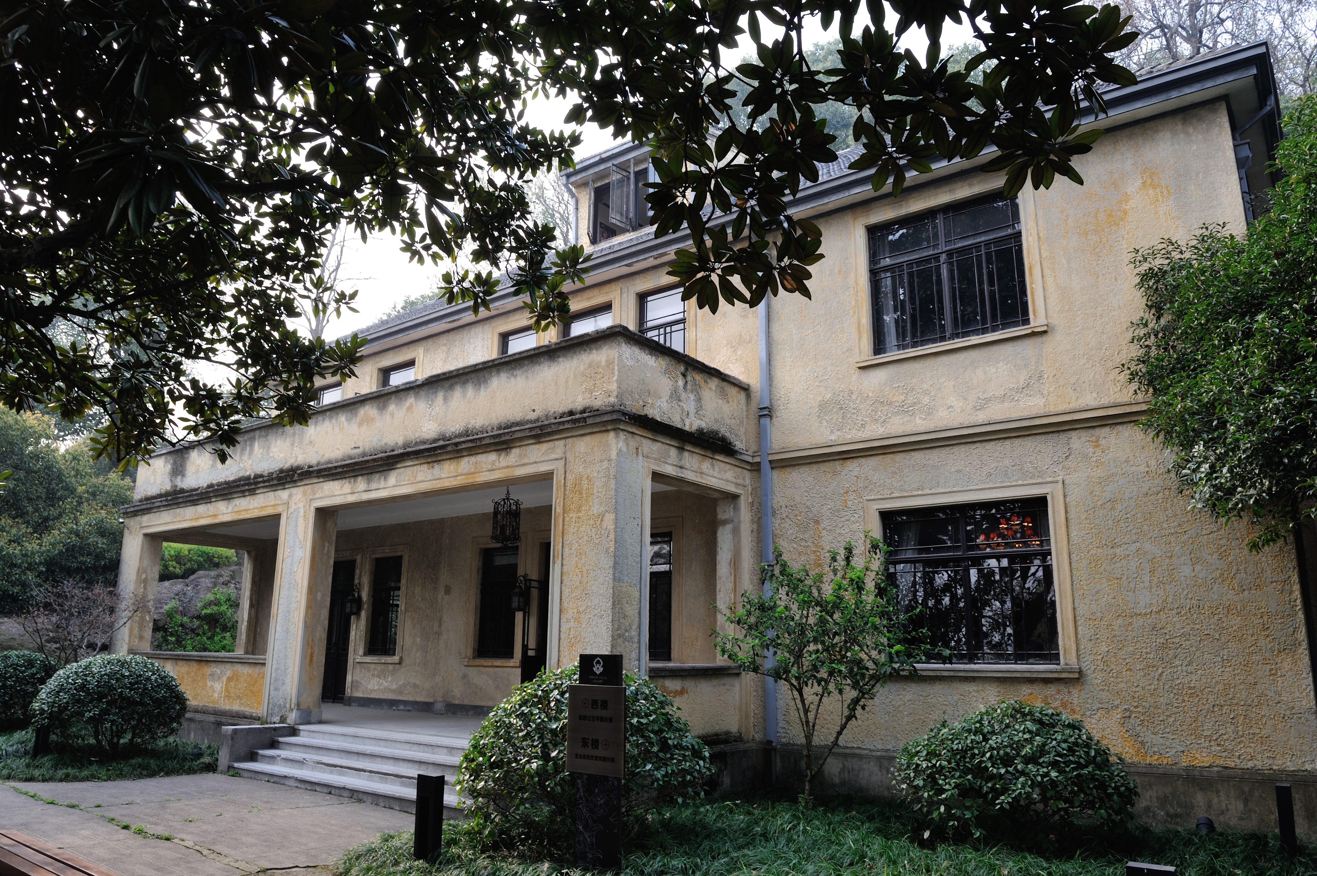 北山路近代建筑群——静逸别墅